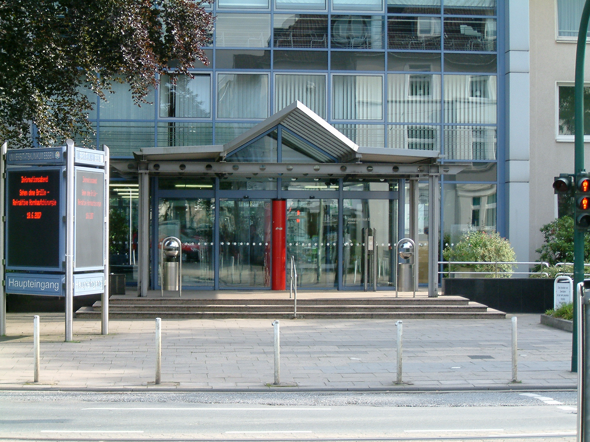 Universitätsklinikum Essen